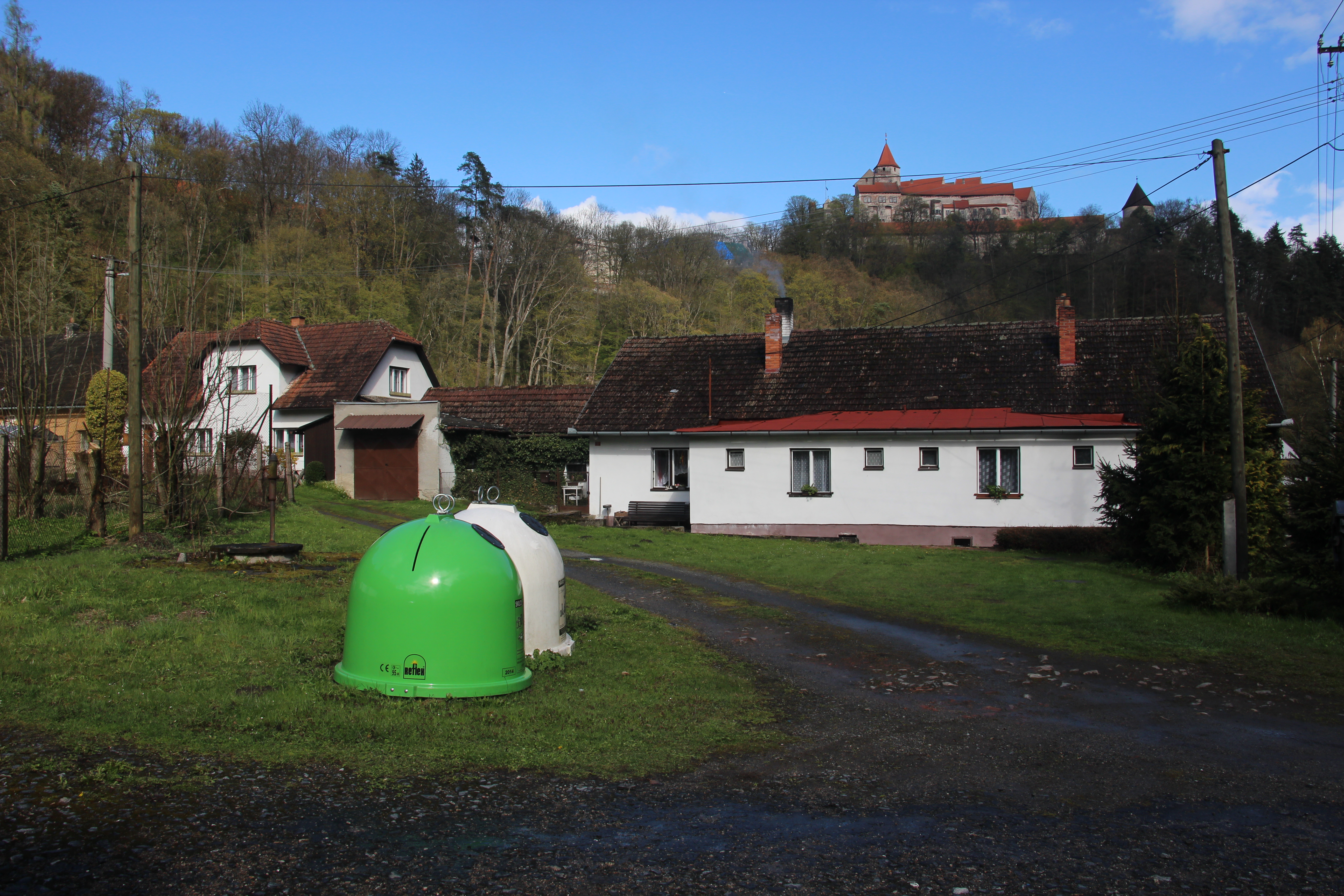 Nedvědice, část Pernštejn, domy na jižním okraji katastru (přes potok od katastru Sejřek) – původní osada v podhradí hradu Pernštejn.